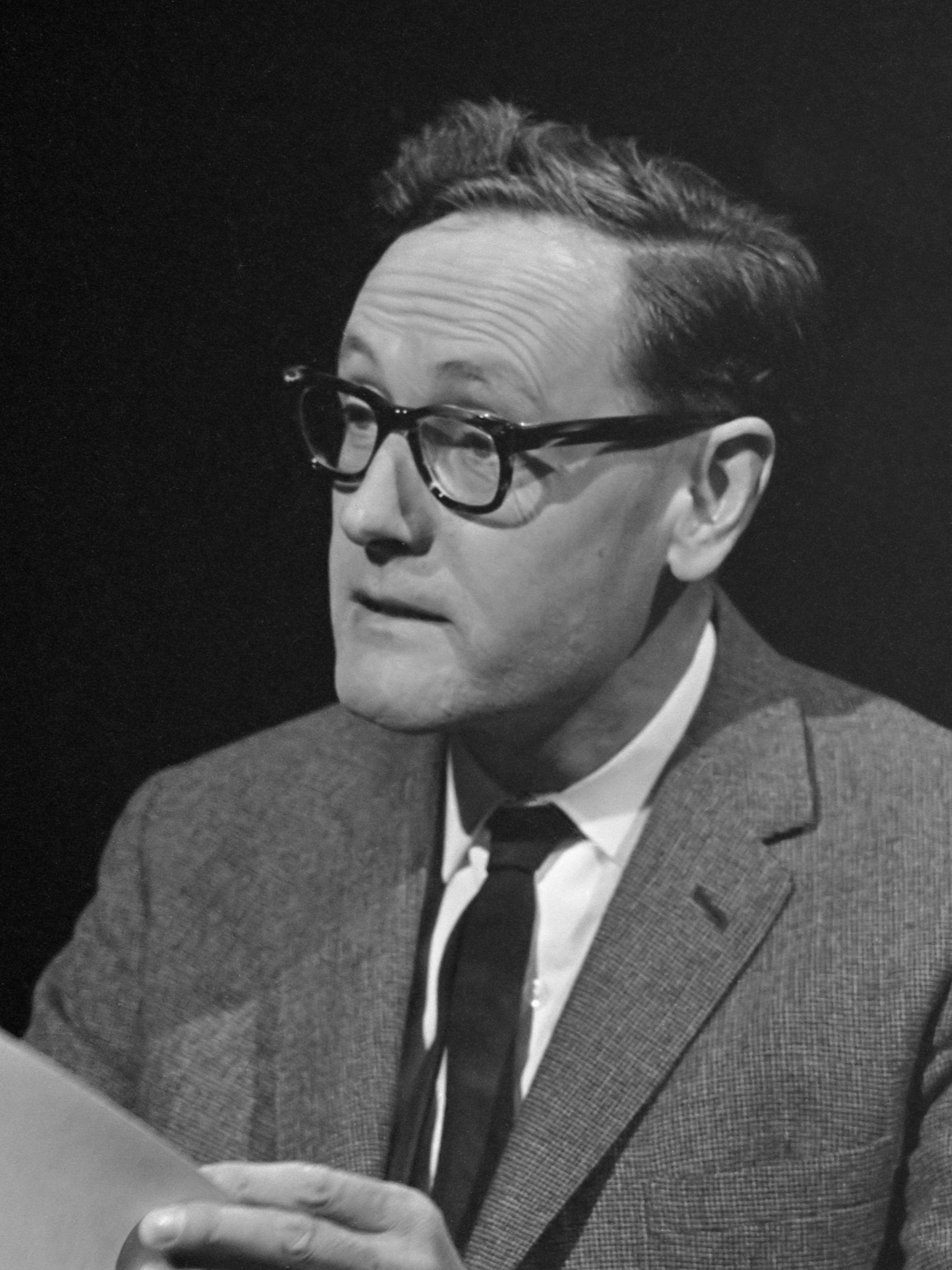 Robert Neild . Nummer 7.8.9 Francis Noel Baker , nummer 10 Mavejev 2 oktober 1967